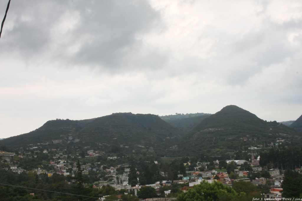 Totolac, Tlaxcala Foto: J. Guadalupe Pérez /2014